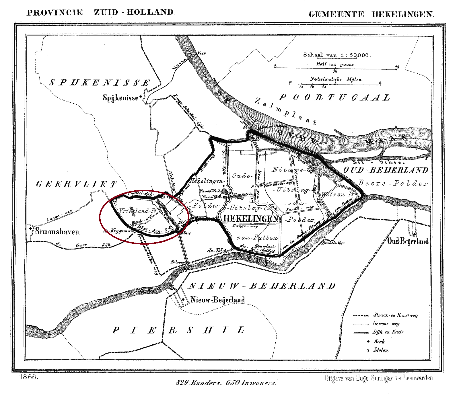 Ligging van de polder Vriesland tussen Hekelingen en Simonshaven op een kaart uit 1866